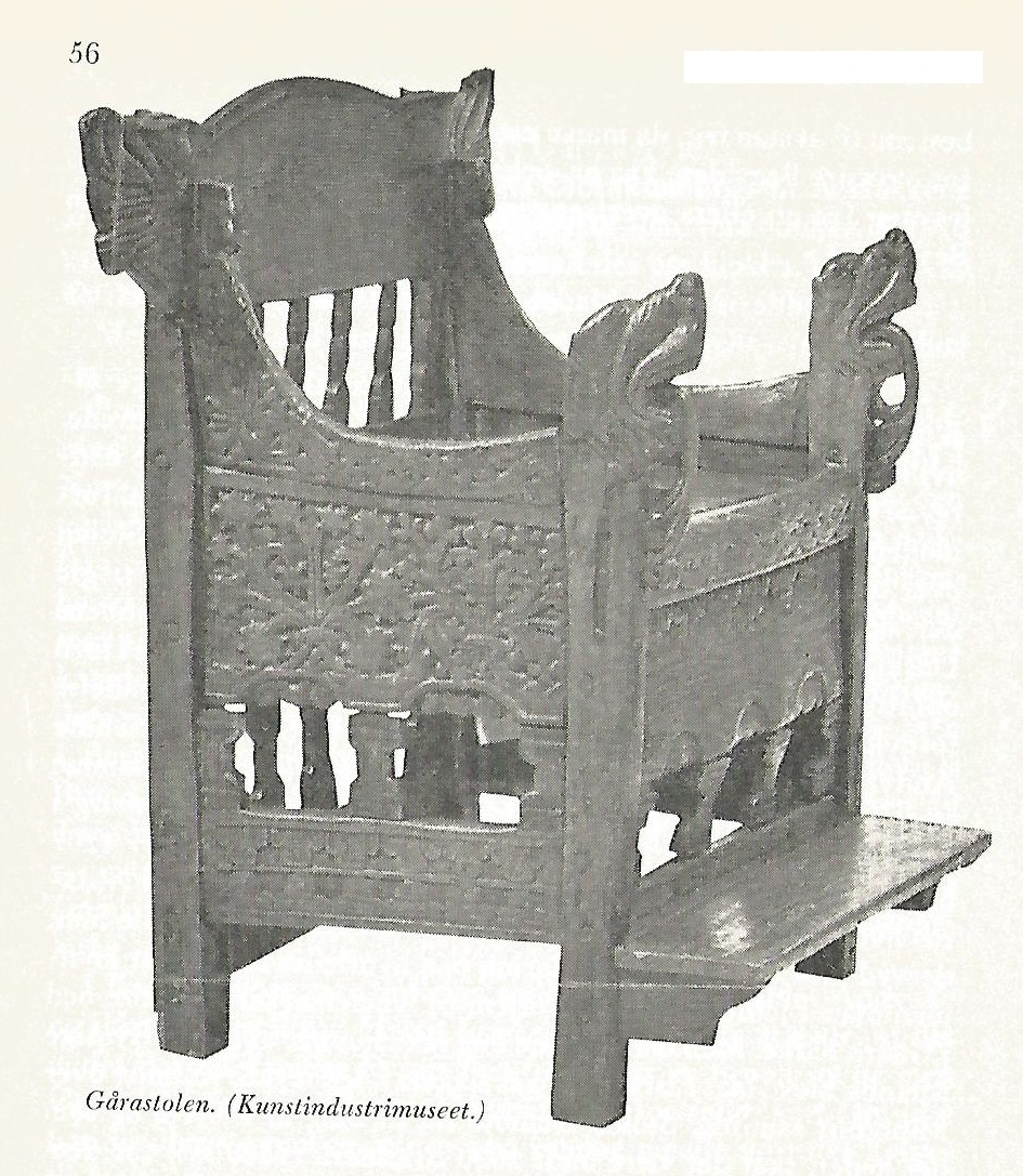 Gårastolen.